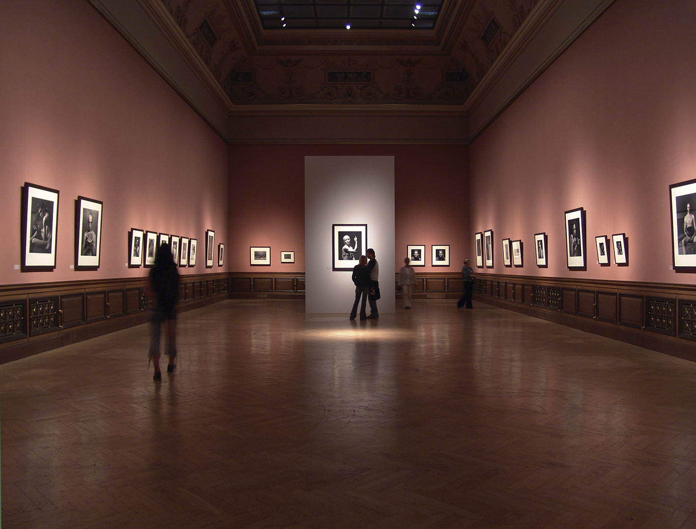 výstava Ivana Pinakvy